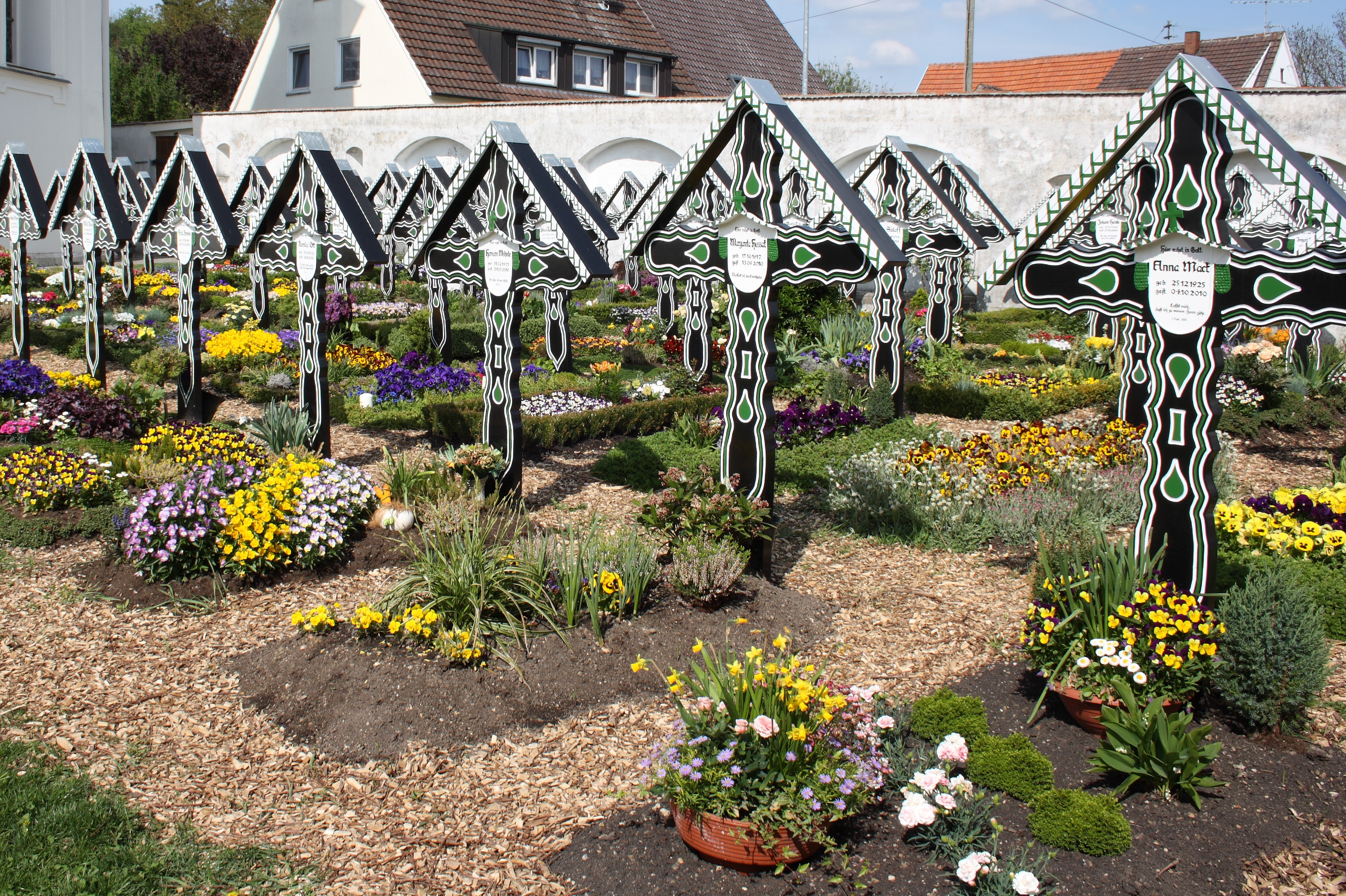 Friedhof an der evangelisch-lutherischen Dreifaltigkeitskirche in Haunsheim, einer Gemeinde im Landkreis Dillingen an der Donau (Bayern) mit einheitlichen Grabkreuzen